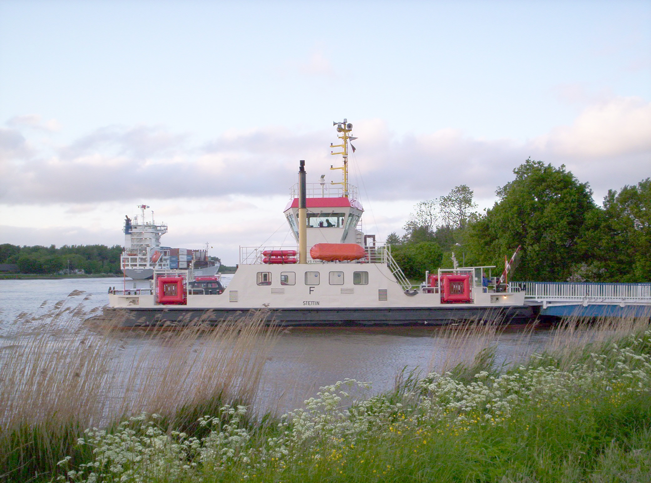 Die an der Fährstelle Kudensee ablegende 45-t-Fähre Stettin mit einem Voith-Schneider-Antrieb wurde 1958 gebaut und 2001 modernisiert.